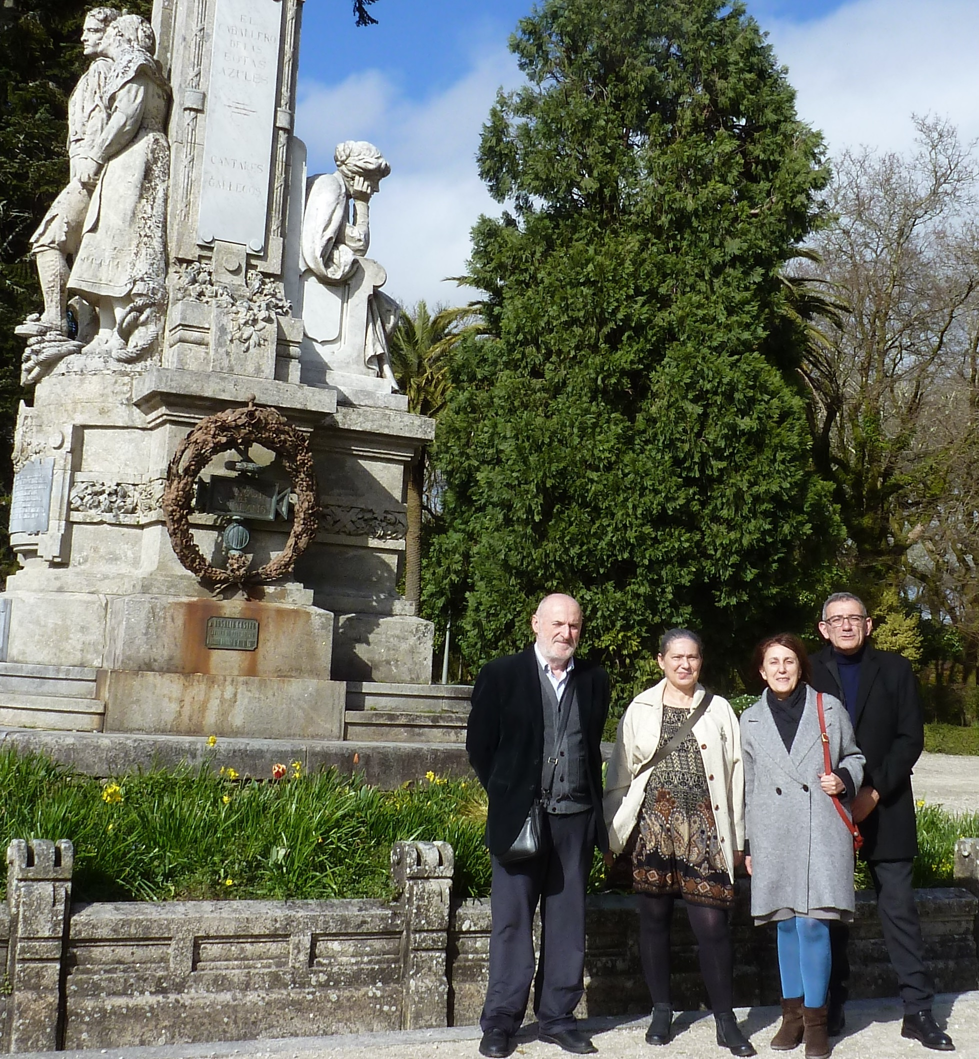 Anxo González Guerra, Vitoria Ogando, Chus Pato e Manuel Igrexas a carón do monumento a Rosalía de Castro en Santiago de Compostela